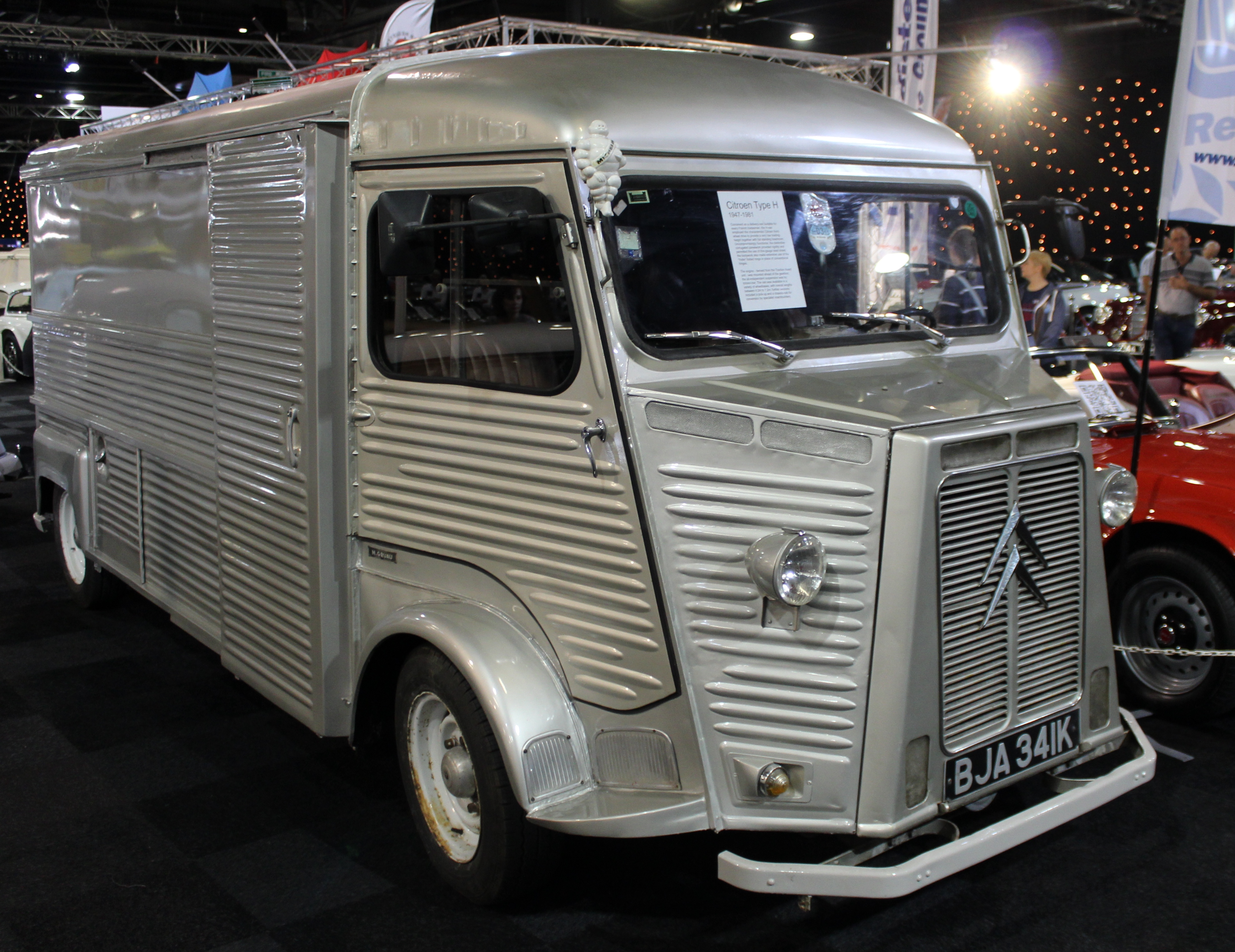 Citroen H van